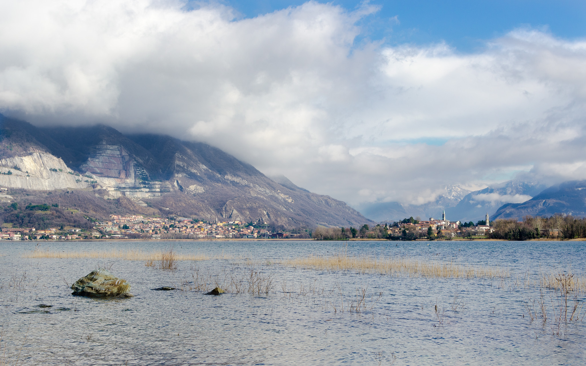 Lago di Pusiano con, sullo sfondo, Bosisio Parini, Pusiano, Cesana Brianza. Veduata dalla Punta del corno.